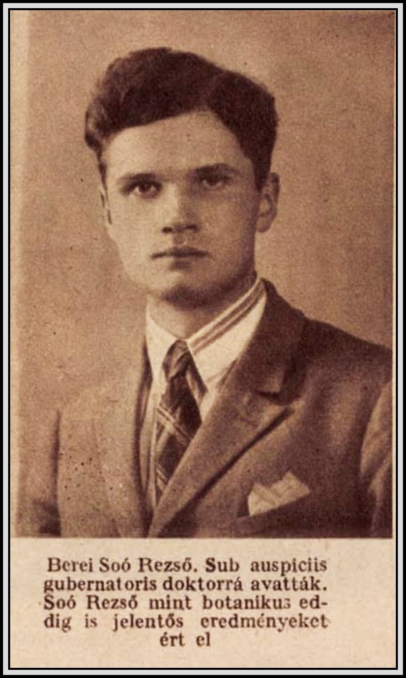 Soó Rezső (Székelyudvarhely, 1903. augusztus 1. – Budapest, 1980. február 10.) Kossuth-díjas (1951, 1954) magyar botanikus, egyetemi tanár, az MTA tagja (levelező 1947, rendes 1951). Botanikai szakmunkákban nevének rövidítése: „Soó”.